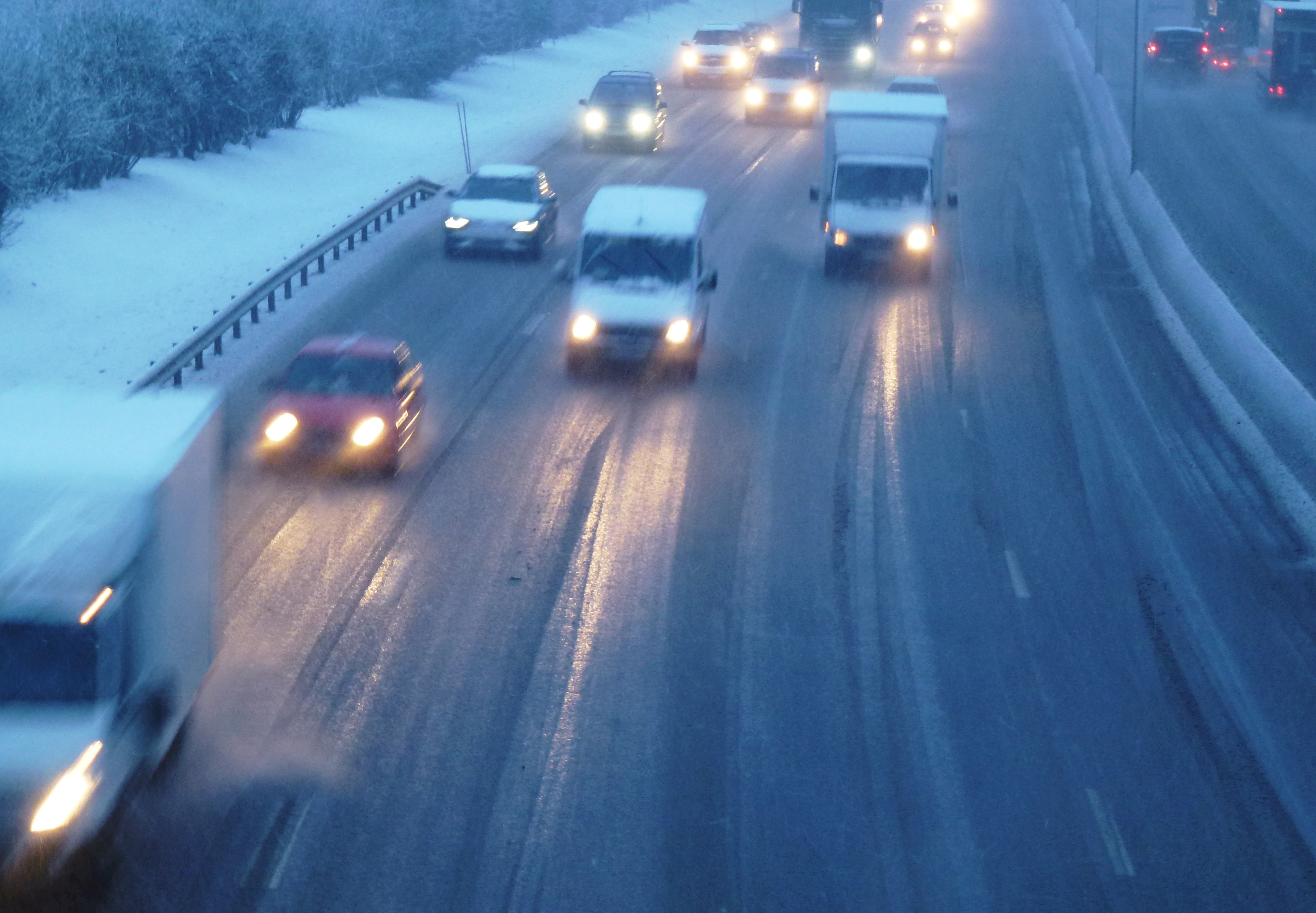 Södertäljevägen vinter och ishalka